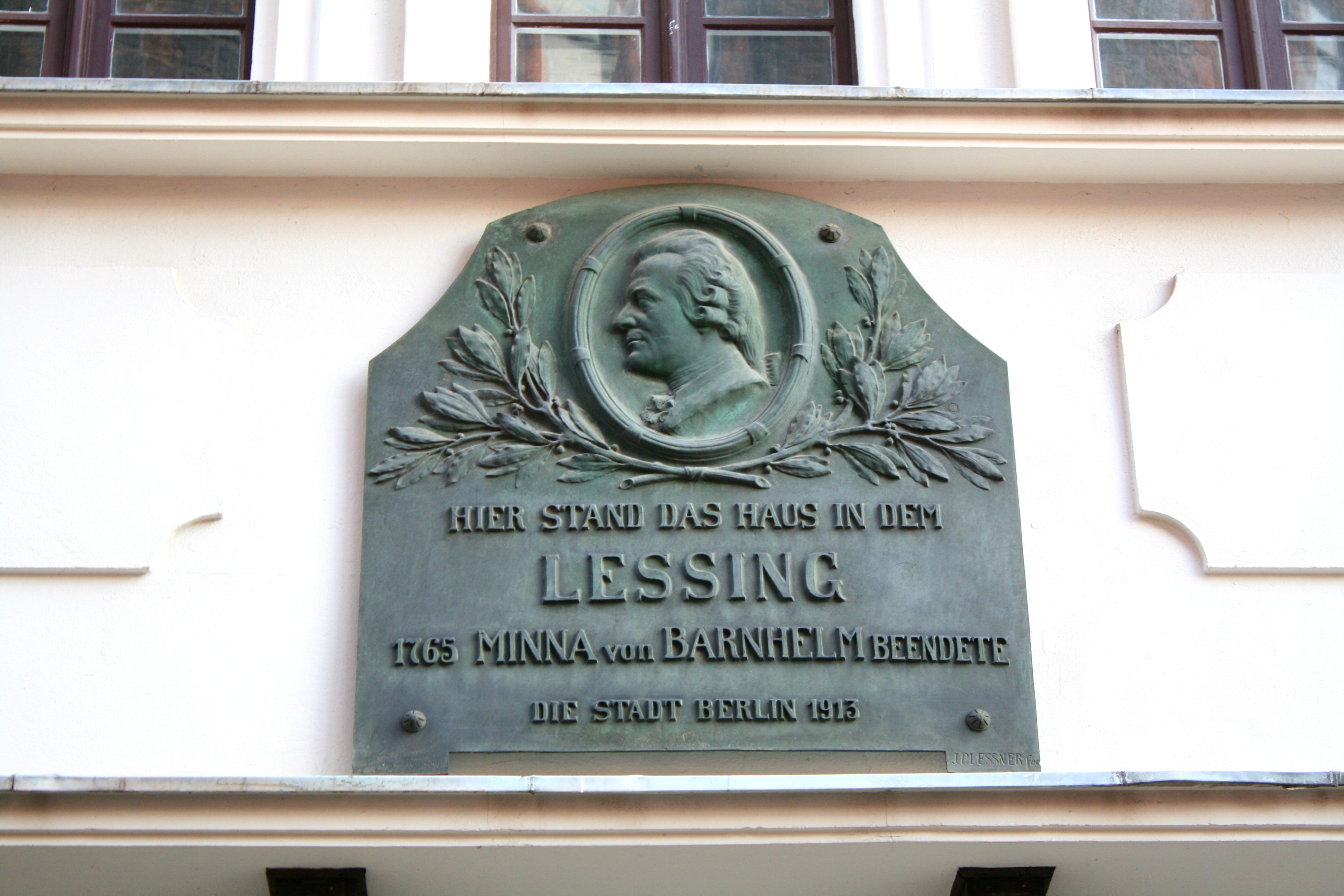 Gedenktafel zu Ehren Gotthold Ephraim Lessings am Haus Nikolaikirchplatz 7 im Nikolaiviertel in Berlin